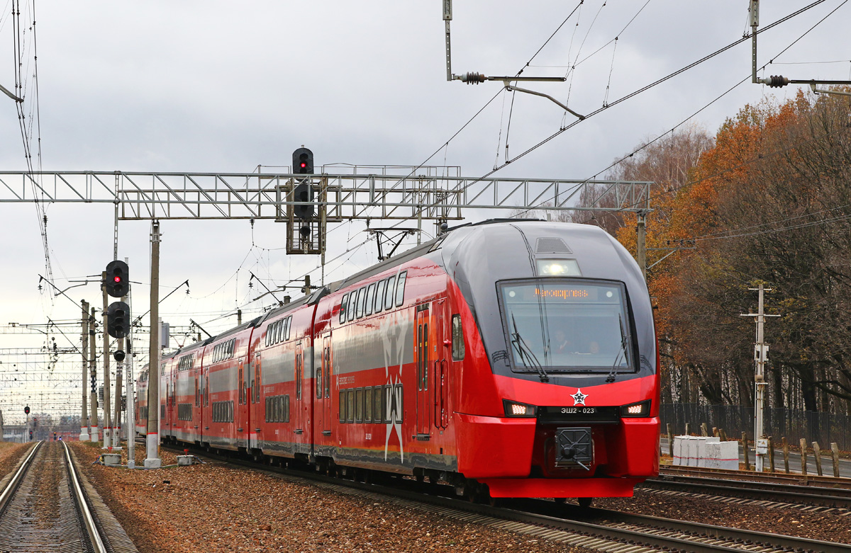 Построен в шестивагонной составности В декабре 2016 г. с завода поступил в собственность компании «Аэроэкспресс» Эксплуатировался на маршруте Москва (Киевский вокзал) — Аэропорт Внуково. В январе 2018 года эксплуатируется на маршруте Москва (Павелецкий вокзал) — Аэропорт Домодедово.